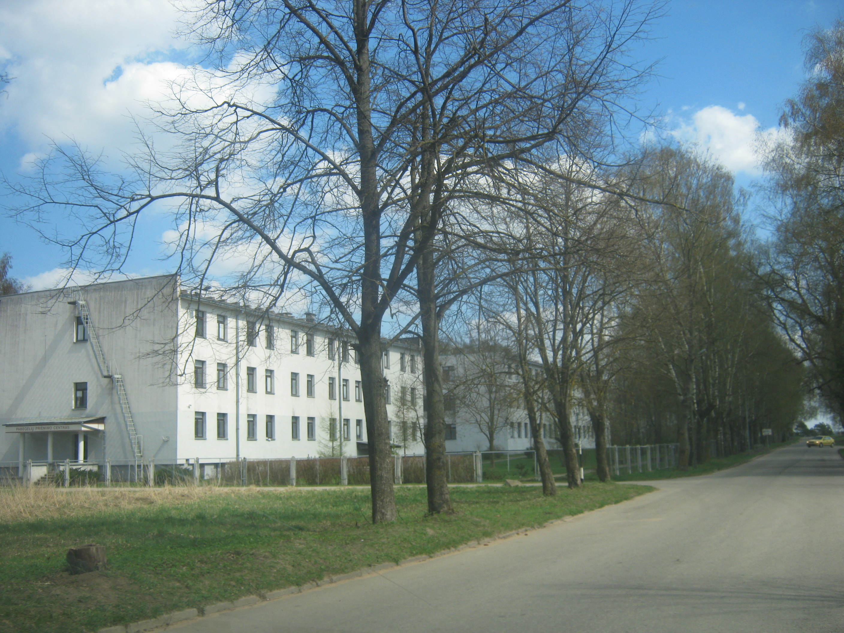 Rukla, Jonavos raj.